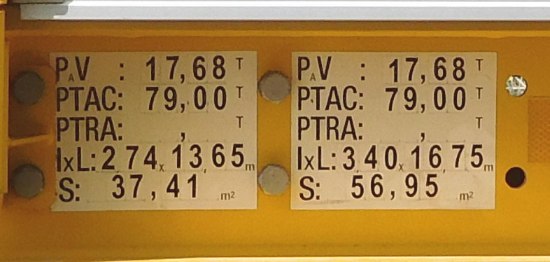 Plaque constructeur (PV, PTAC, l×L et S indiqués) sur une semi-remorque (de marque ALS) d'un tracteur routier porte-engins DAF.